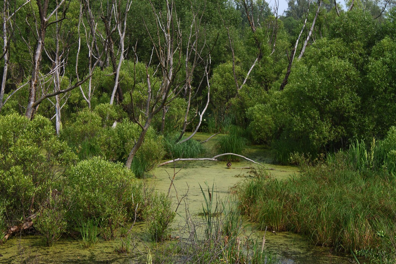 Тярлевский ручей - приток Славянки. В районе Павловского вокзала